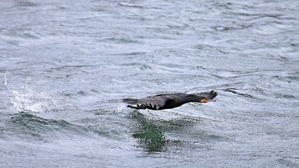 Tief fliegender Kormoran in Mecklenburg